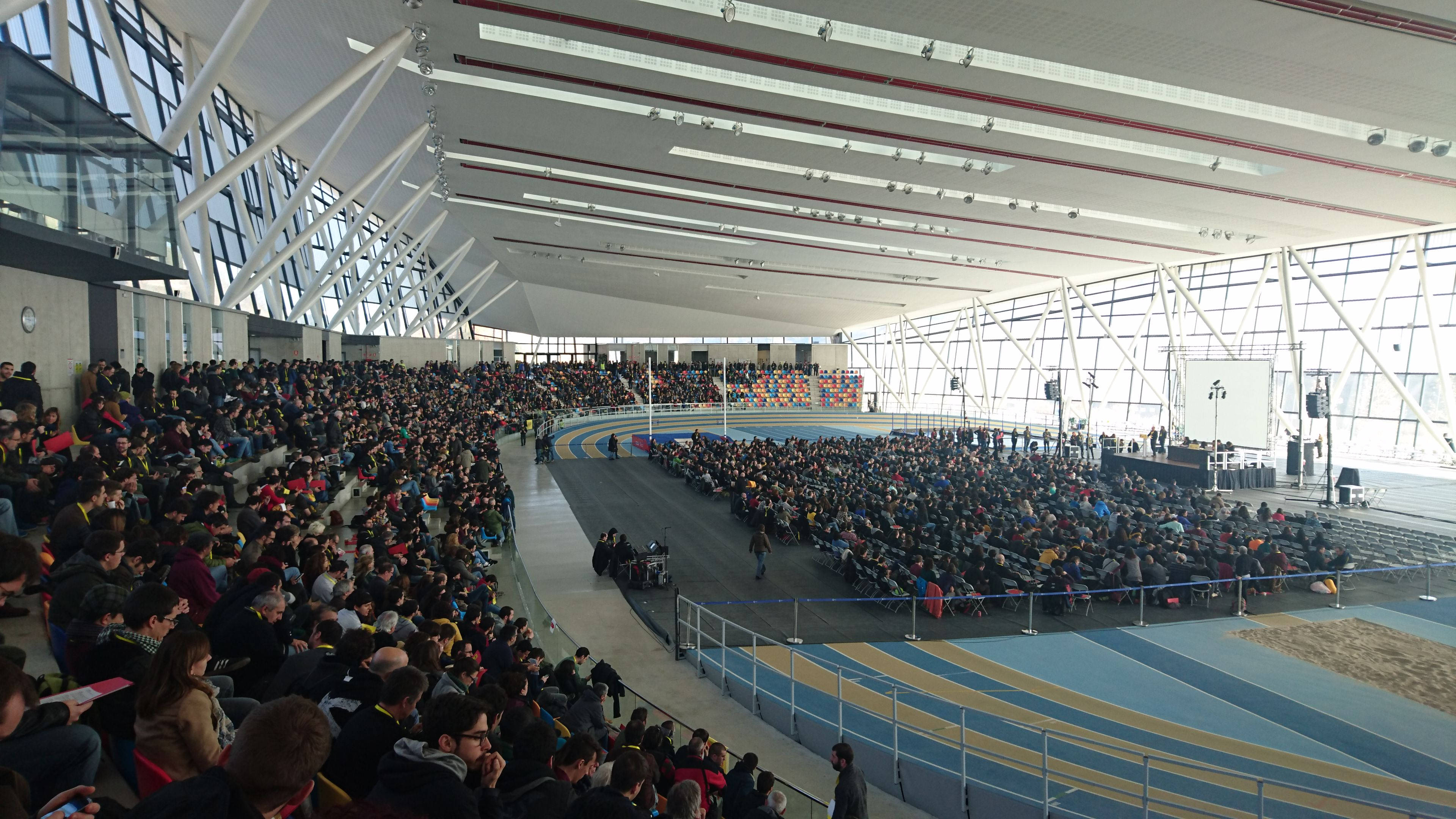 Assemblea Nacional extraordinària de la Candidatura d'Unitat Popular sobre el possible pacte d'investidura amb Junts pel Sí, celebrat a la pista coberta municipal d'atletisme de Sabadell (Vallès Occidental) el 27 de desembre de 2015.